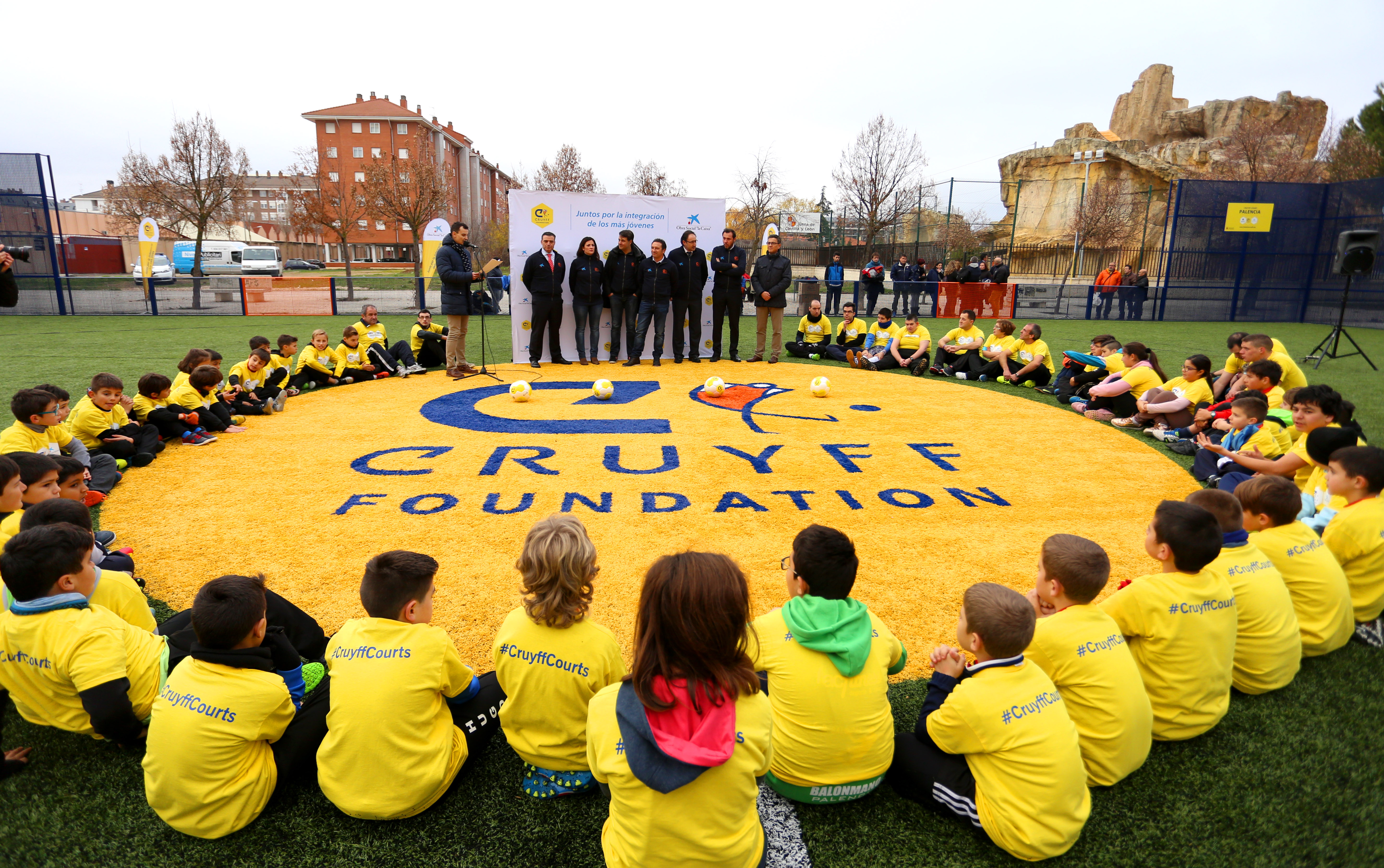 Cruyff Court en Palencia